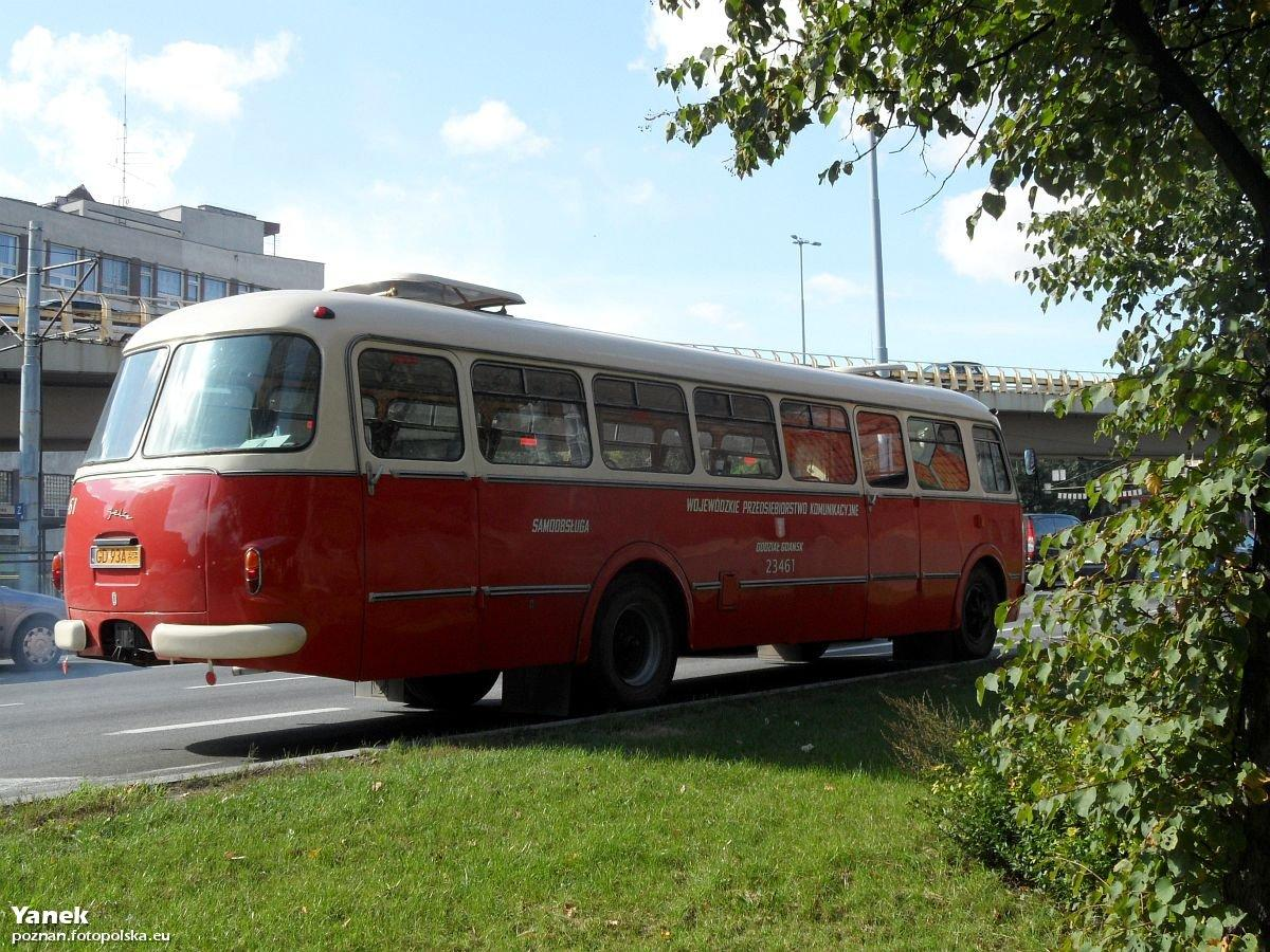 Gdańsk. "Ogórek" z tyłu.